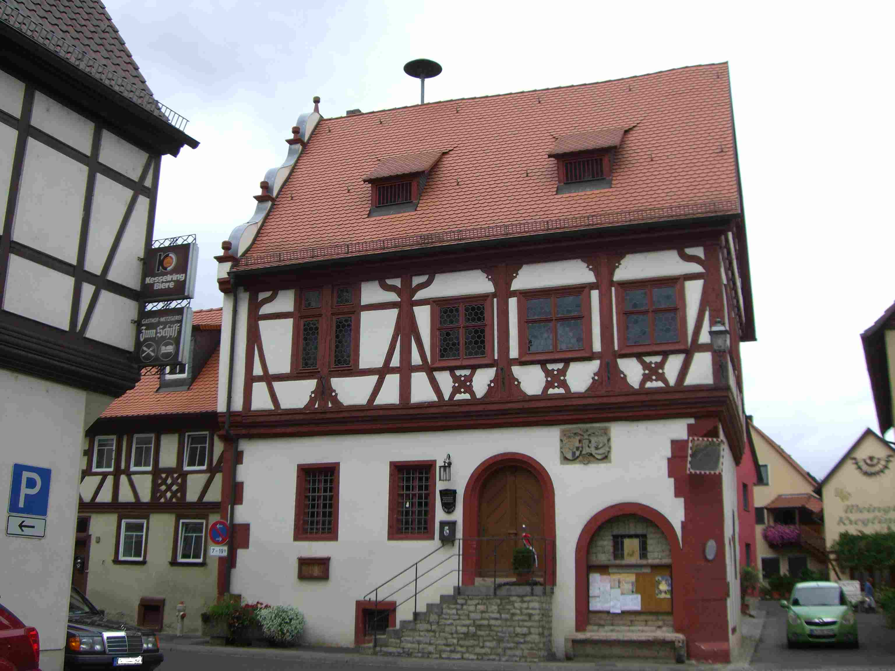 Segnitz, Hans-Kesenbrod- Straße 15, Rathaus, 1588 erbaut von Hans Kesenbrod und Lorenz Ebel